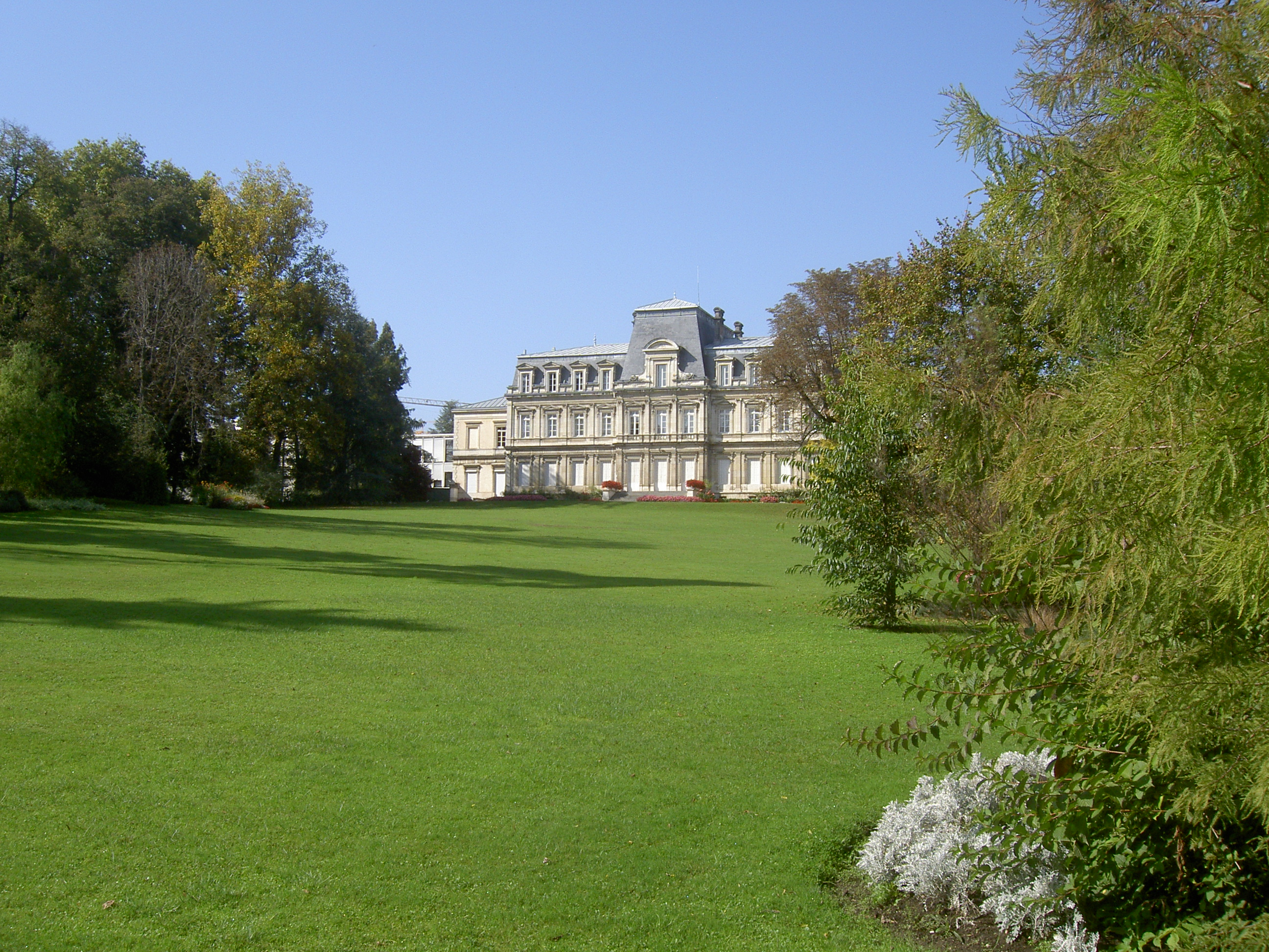 Préfecture de l'Ain